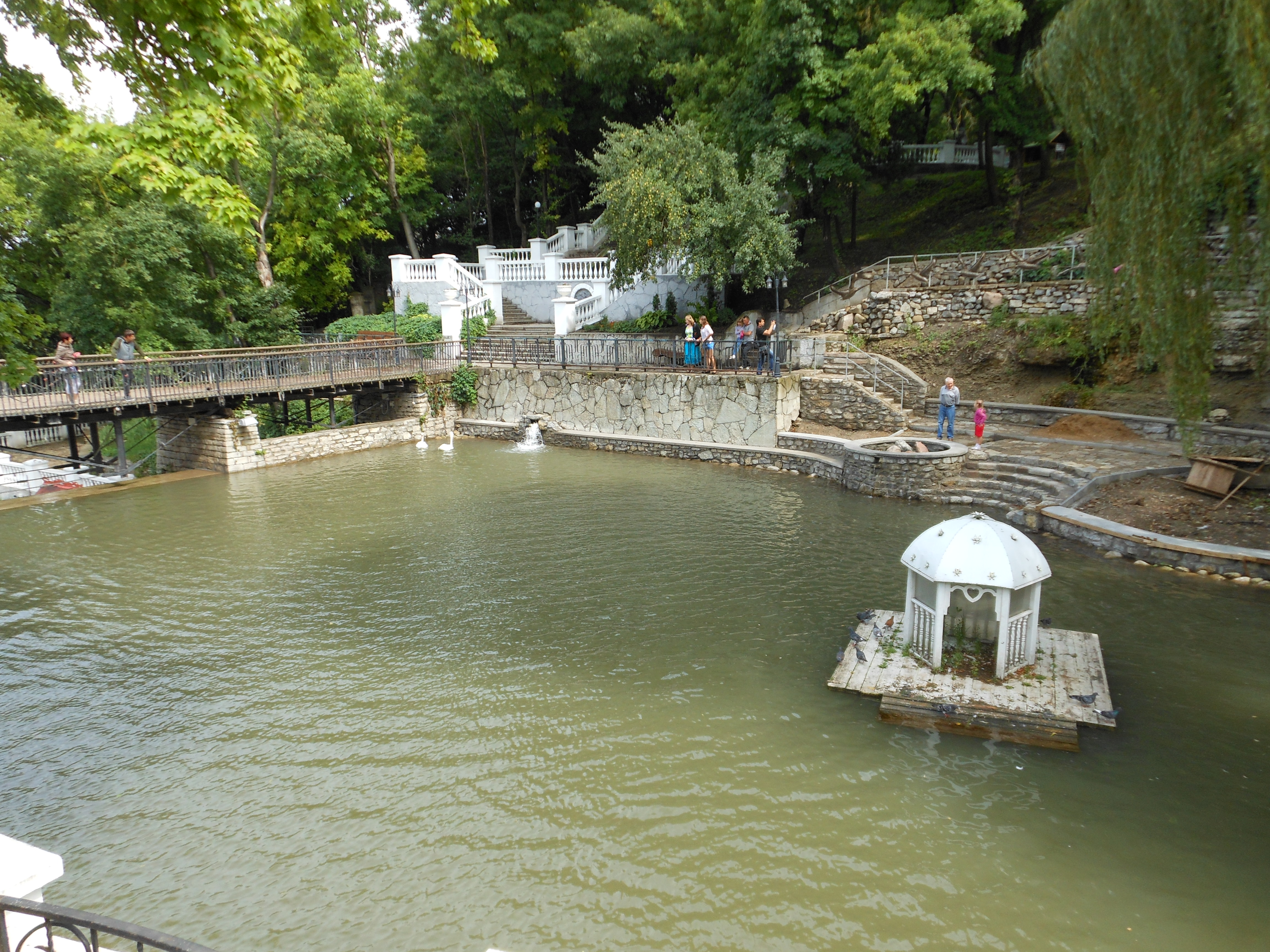 Комплекс архітектурних форм паркової алеї, Кам'янець-Подільський, вул. Князів Коріатовичів